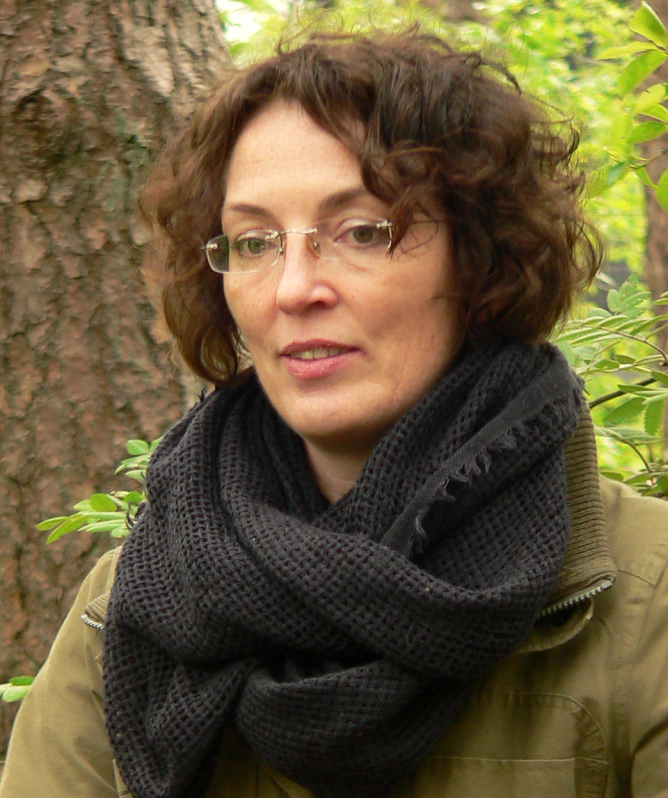 LWL-Archäologin Bettina Tremmel beim Römerlager Bielefeld